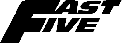 Logo The Fast and the Furious 5